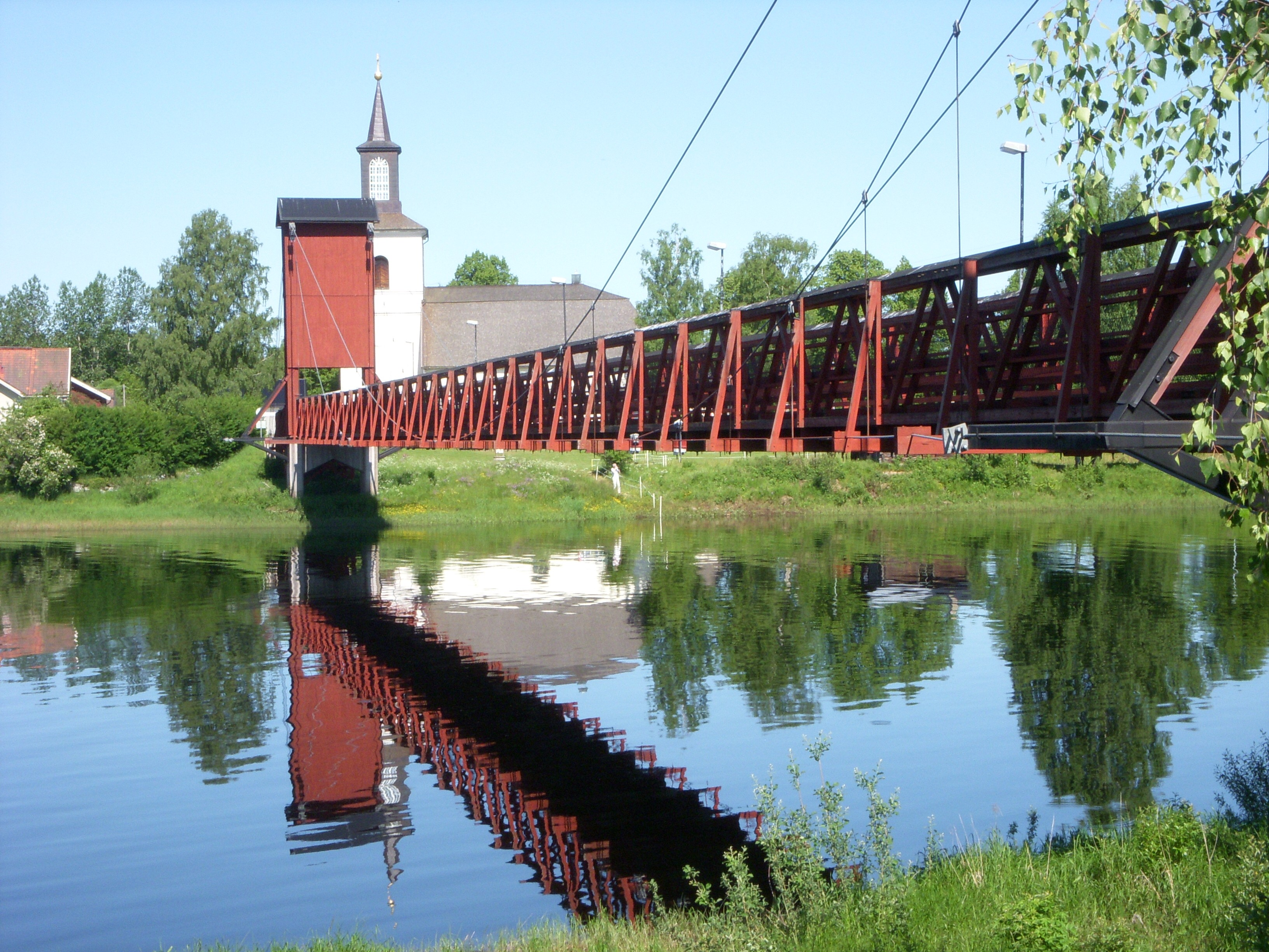 Hängbron i Dala-Floda med Dala-Floda kyrka